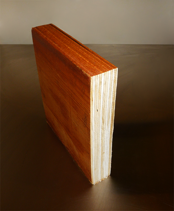 Laminated veneer lumber detail